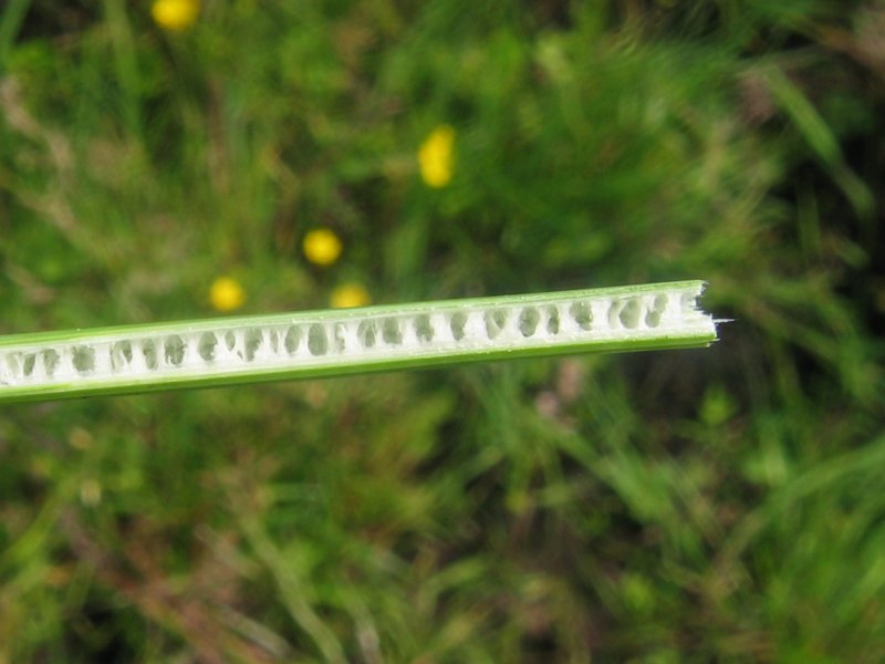 Gekammertes Mark der Blaugrünen Binse Juncus inflexus, Gragetopshof bei Rostock